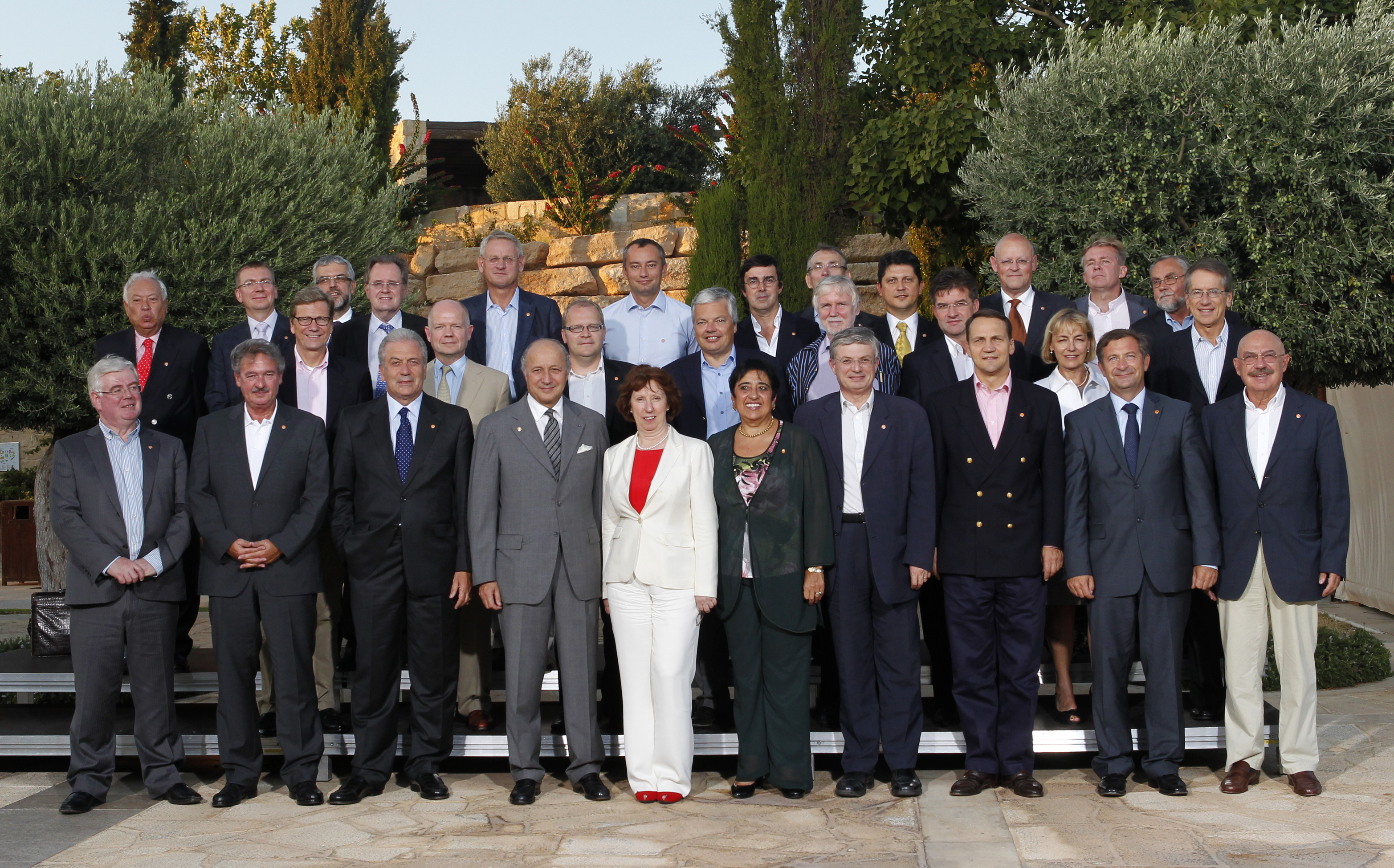 EU Foreign Ministers Gymnich Meeting in Cyprus. 7.-8. September 2012